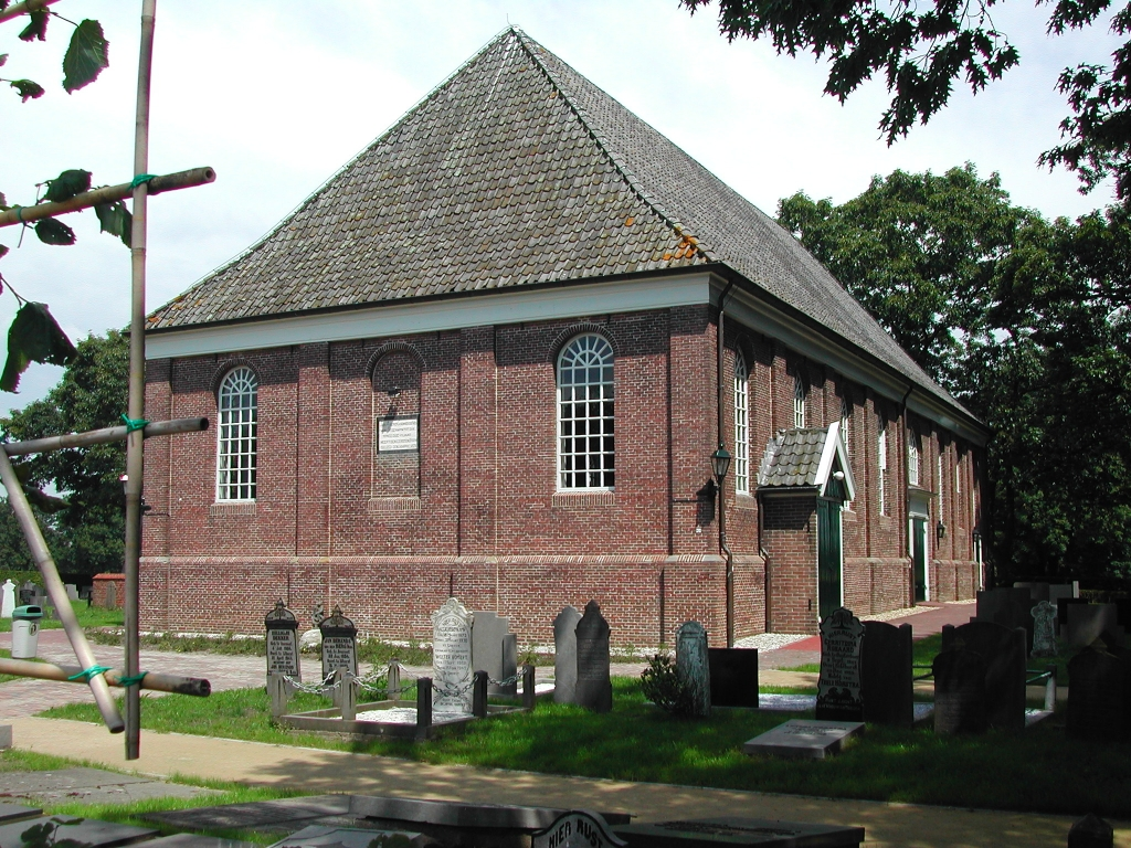 Kerk gemeente De Wijk-IJhorst. Foto afkomstig van het Byzantijns Koor Drenthe.